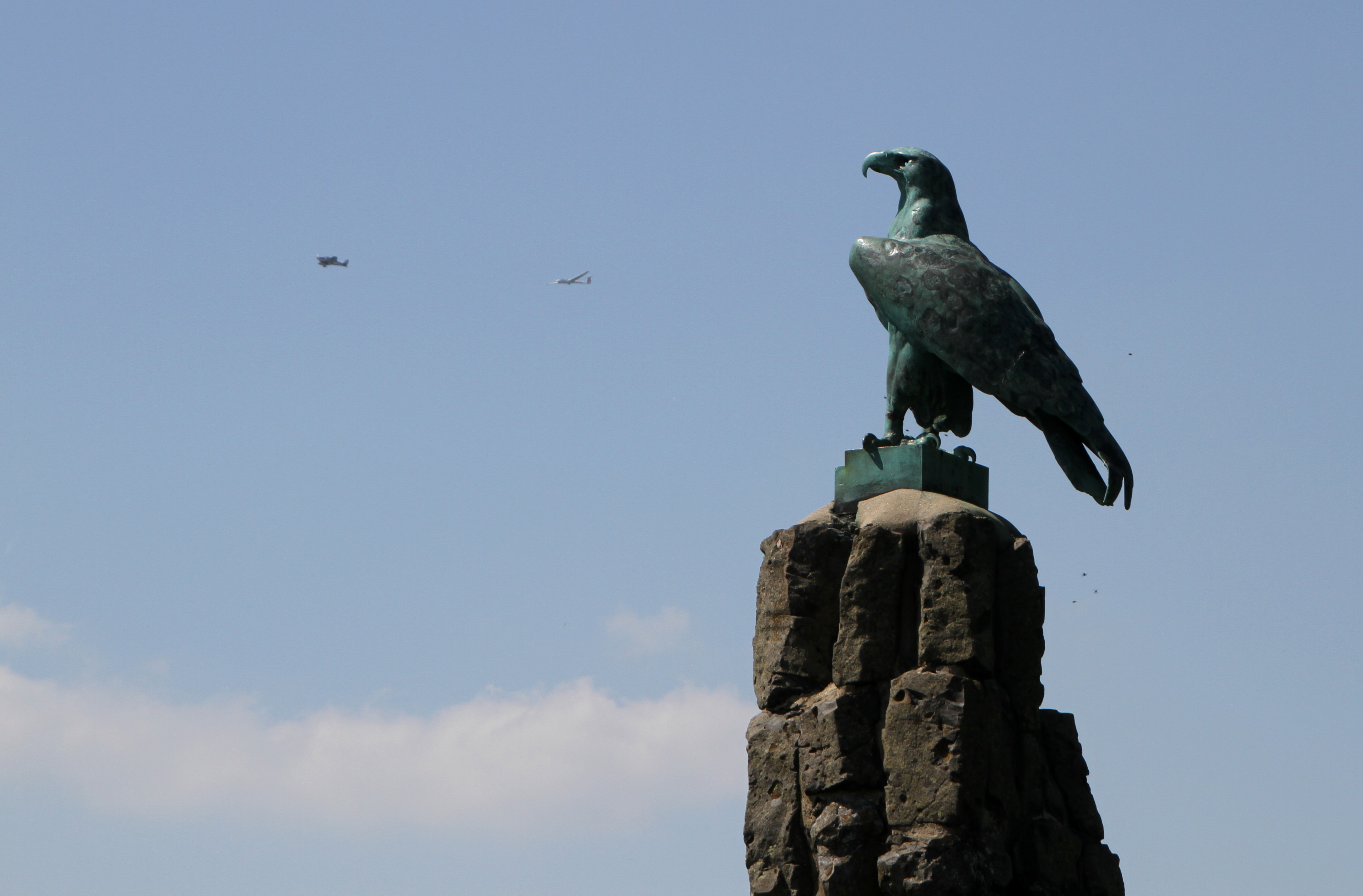 Wasserkuppe in der Rhön in Hessen